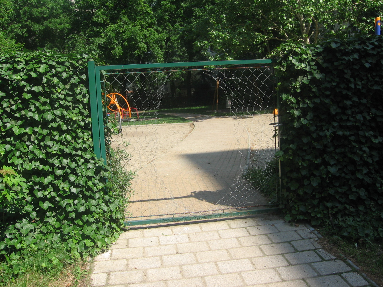 Megrongált kapu a debreceni Arany János téren